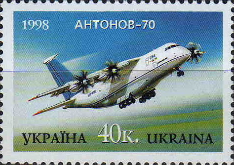 Antonov An-70 on stamp 1998